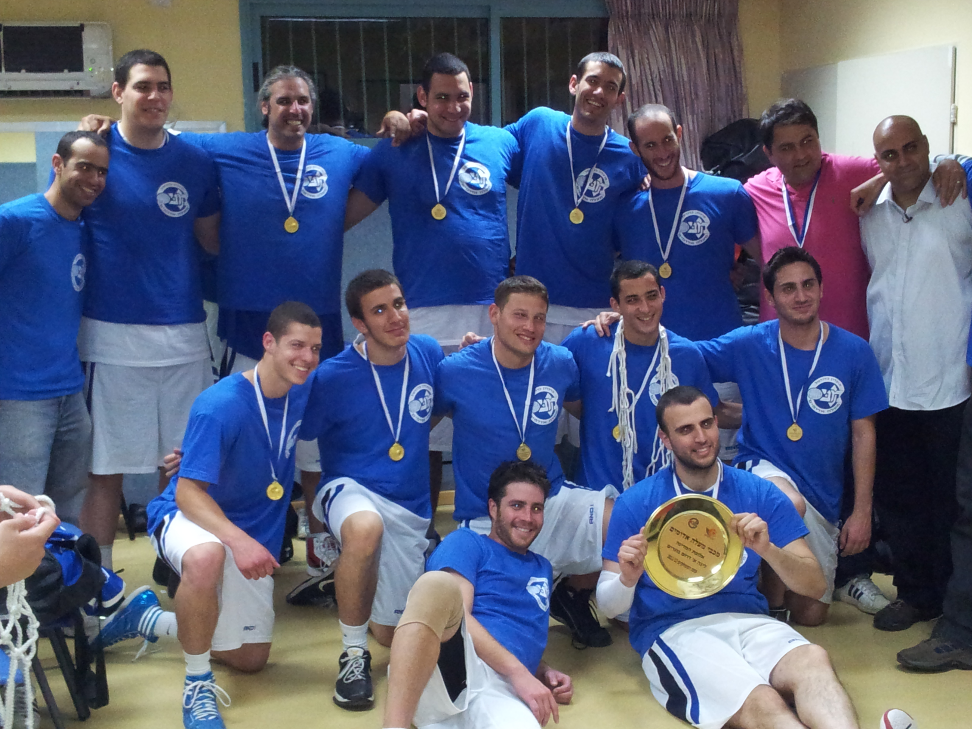 תמונות אליפות ליגה א